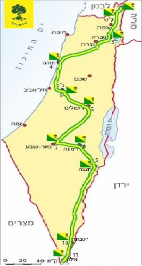 מסלול המרוץ הראשון של גולני ב-1979